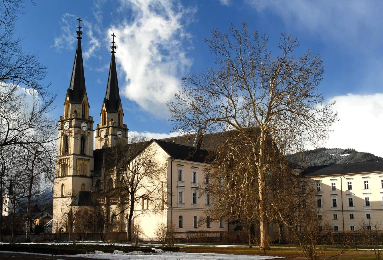 Admont, Benediktinerstift